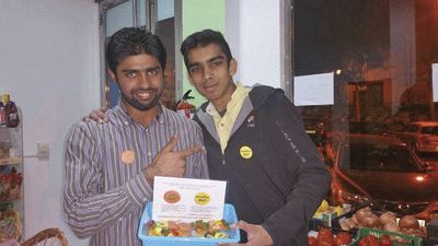 Arrigorriagan, Baietz 365! ekimenean "Nik bai" eta "Nirekin bai" rolak sortu zituzten